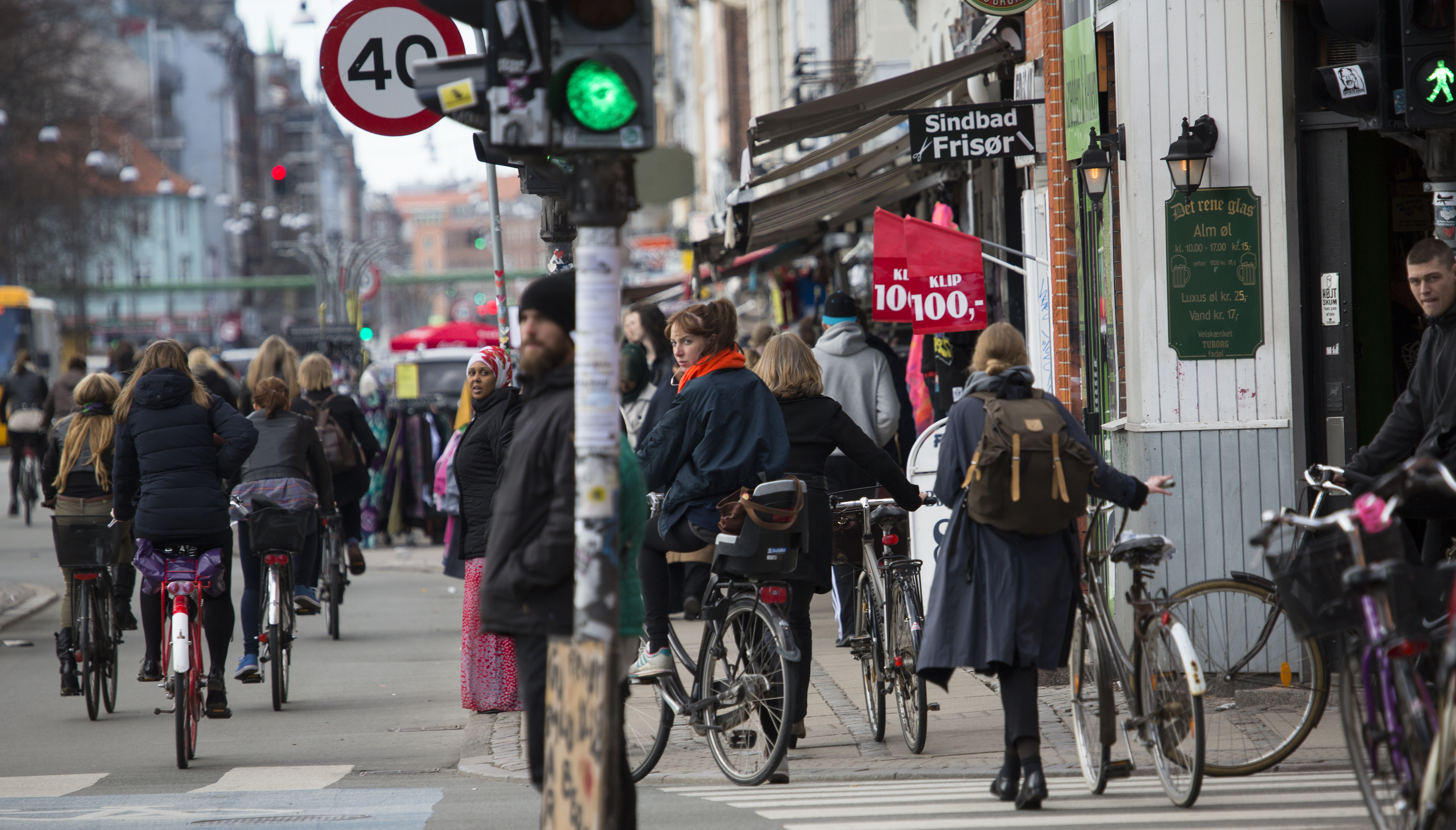 Nørrebrogade, København. Foto: News Øresund – Johan Wessman 21 april 2013. © News Øresund. Bilden får fritt publiceras under förutsättning att källa anges. The picture can be used freely under the prerequisite that the source is given. Originalfil tillhandahålles gratis, kontakta: News Øresund, Malmö, Sweden. News Øresund är en oberoende regional nyhetsbyrå som ingår i projektet Øresund Media Platform som drivs av Øresundsinstituttet i partnerskap med Lunds universitet och Roskilde Universitet och med delfinansiering från EU (Interreg IV A Öresund) och 14 regionala, icke kommersiella aktörer.